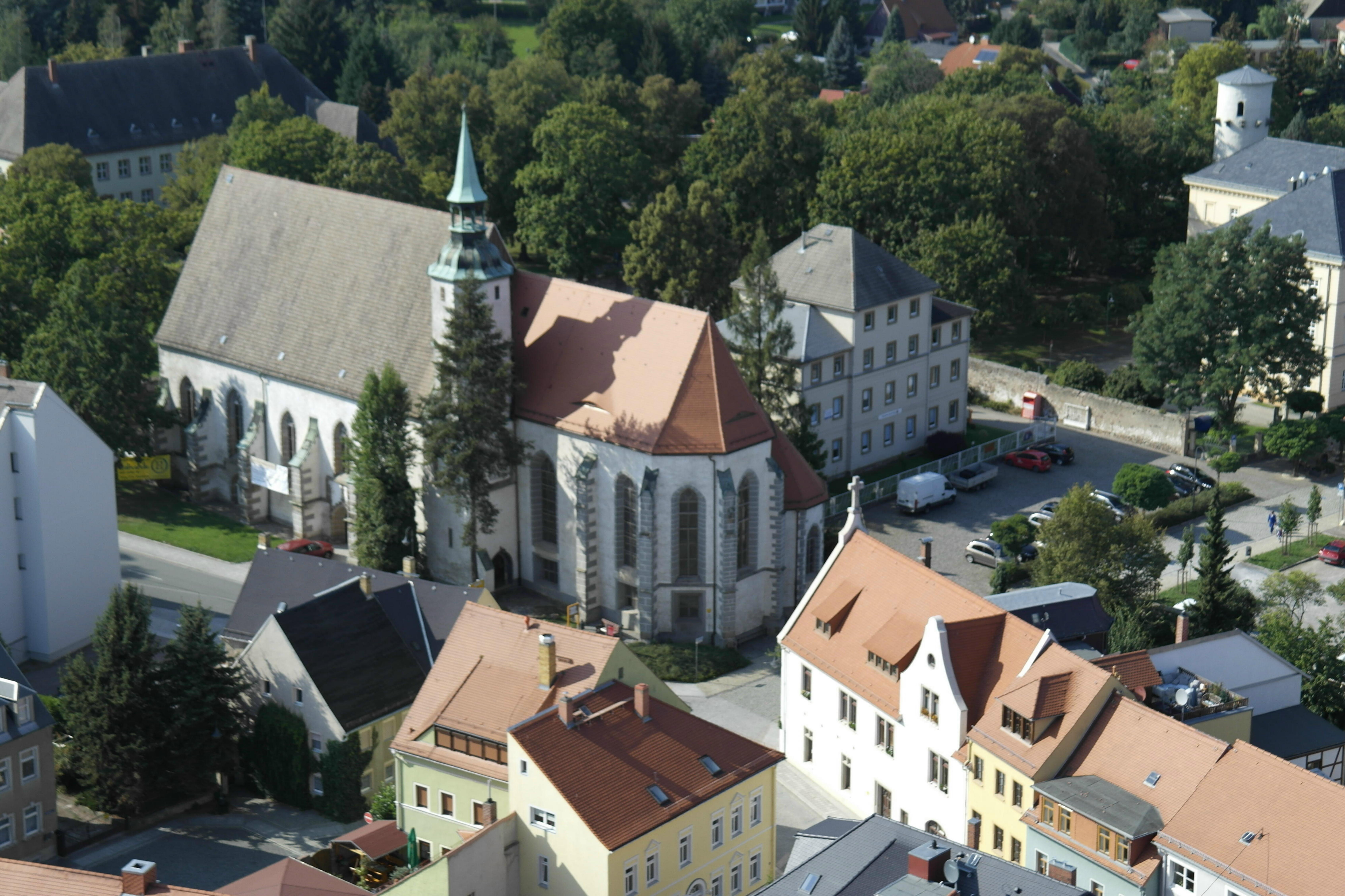 Oschatz, Blick von der St.Aegidien Kirche aus 56m Höhe, Detail Klosterkirche